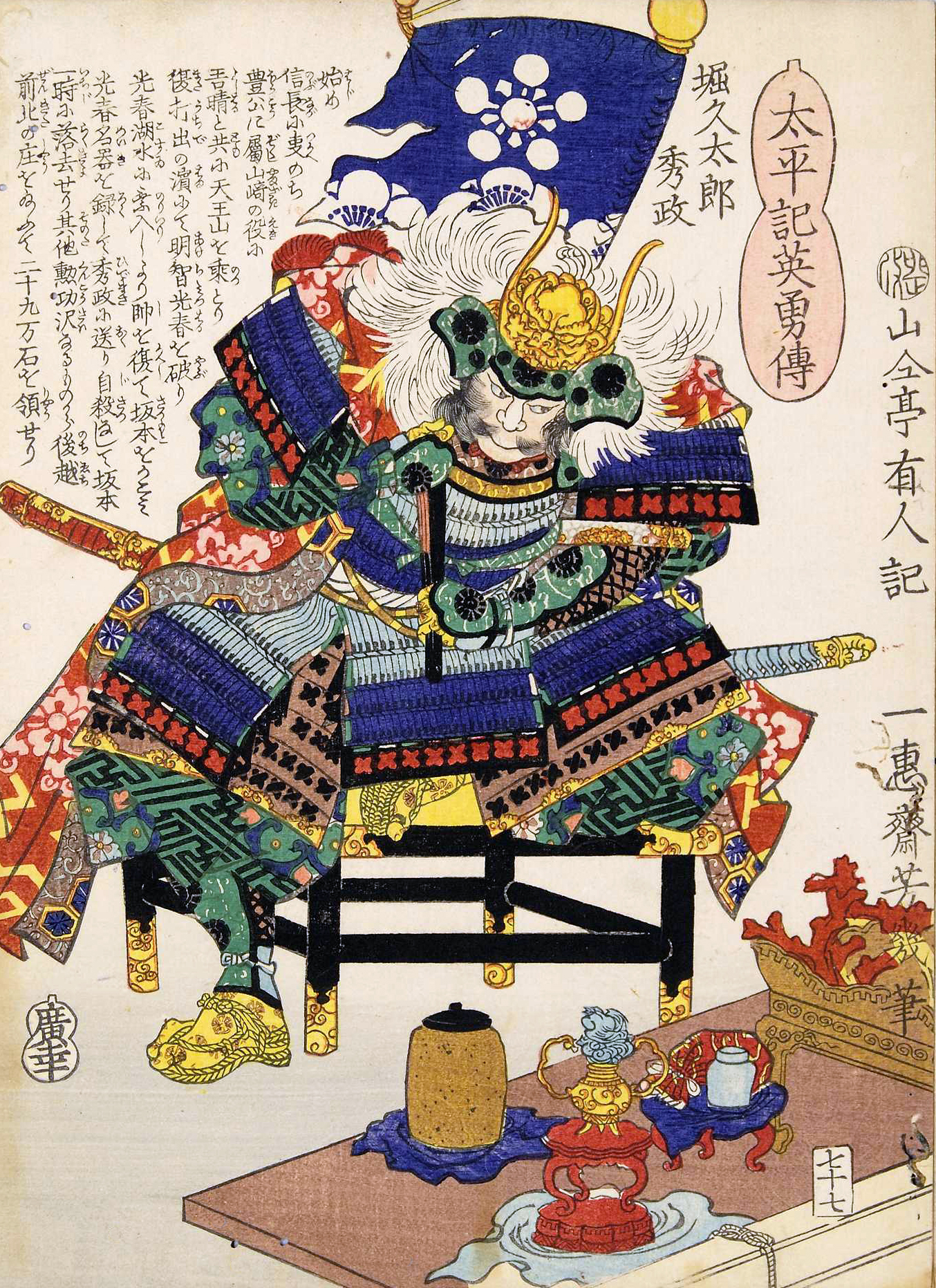 「太平記英勇伝七十七：堀久太郎秀政」